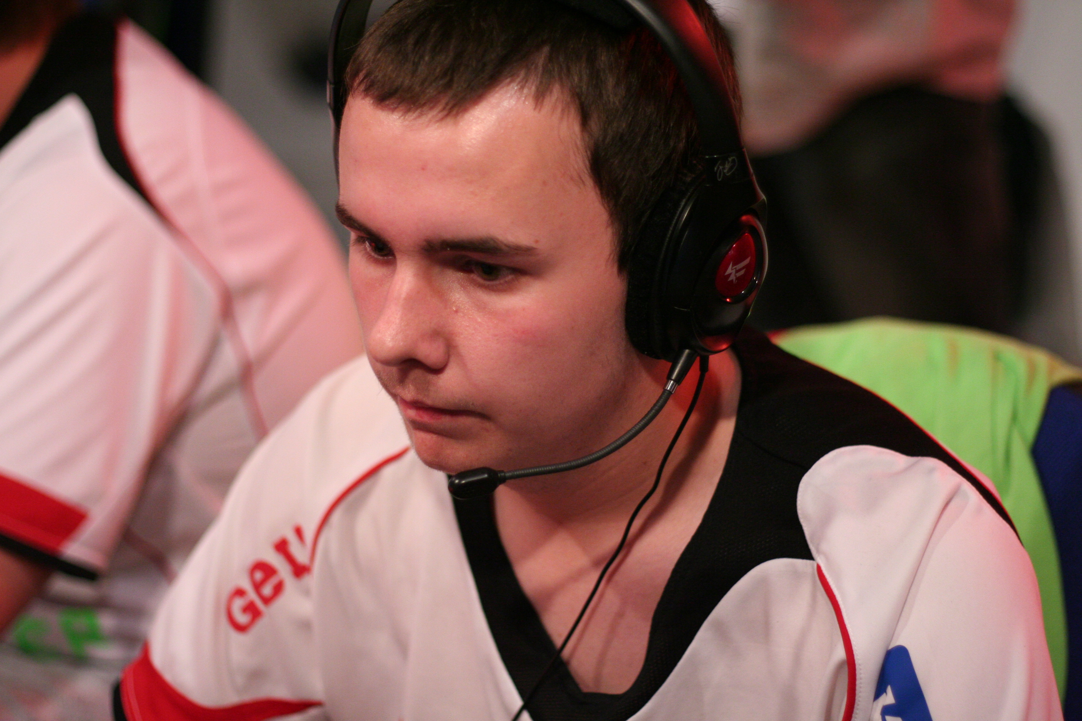 Ладислав на UKeSA Finals 2009